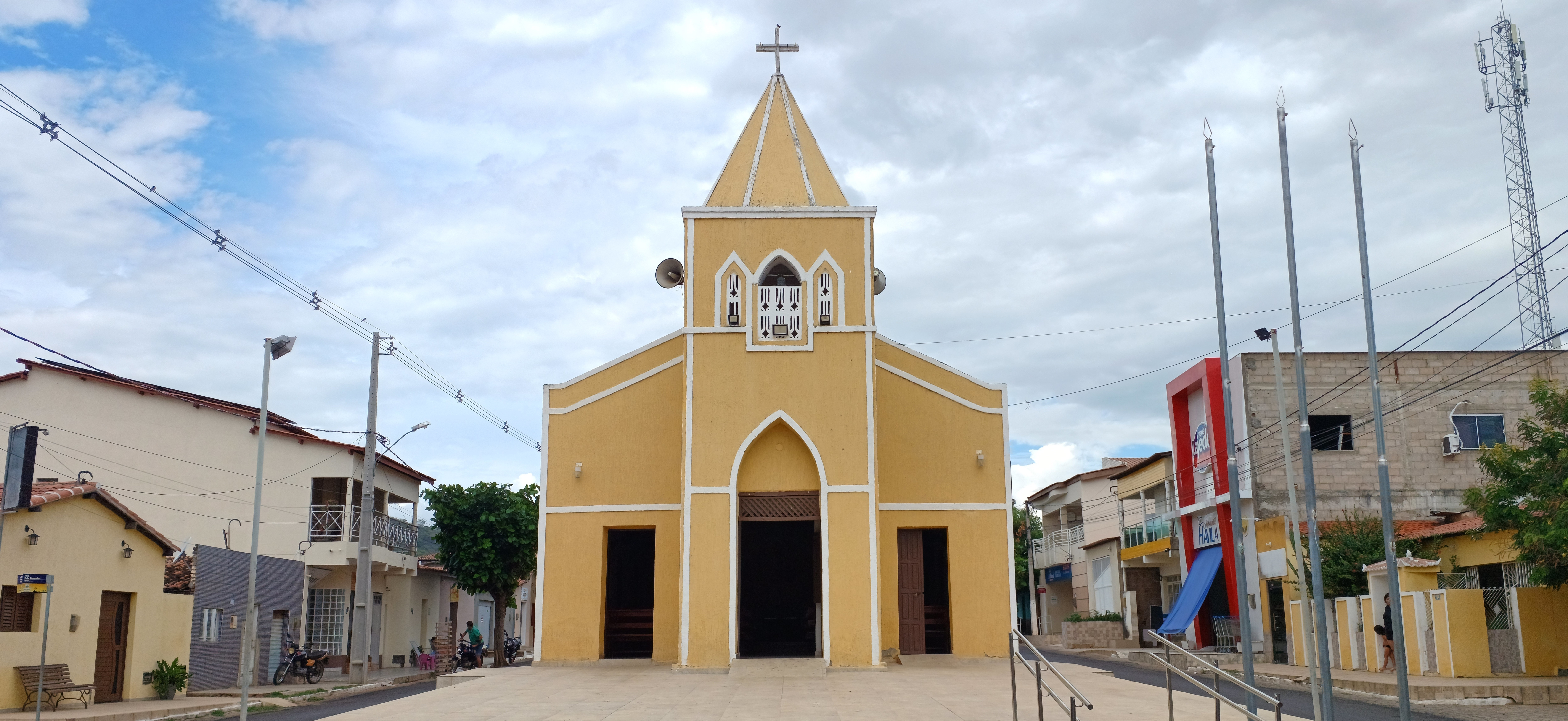 Centro de Água Nova, Rio Grande do Norte (Brasil), com a capela de Nossa Senhora de Fátima ao fundo.